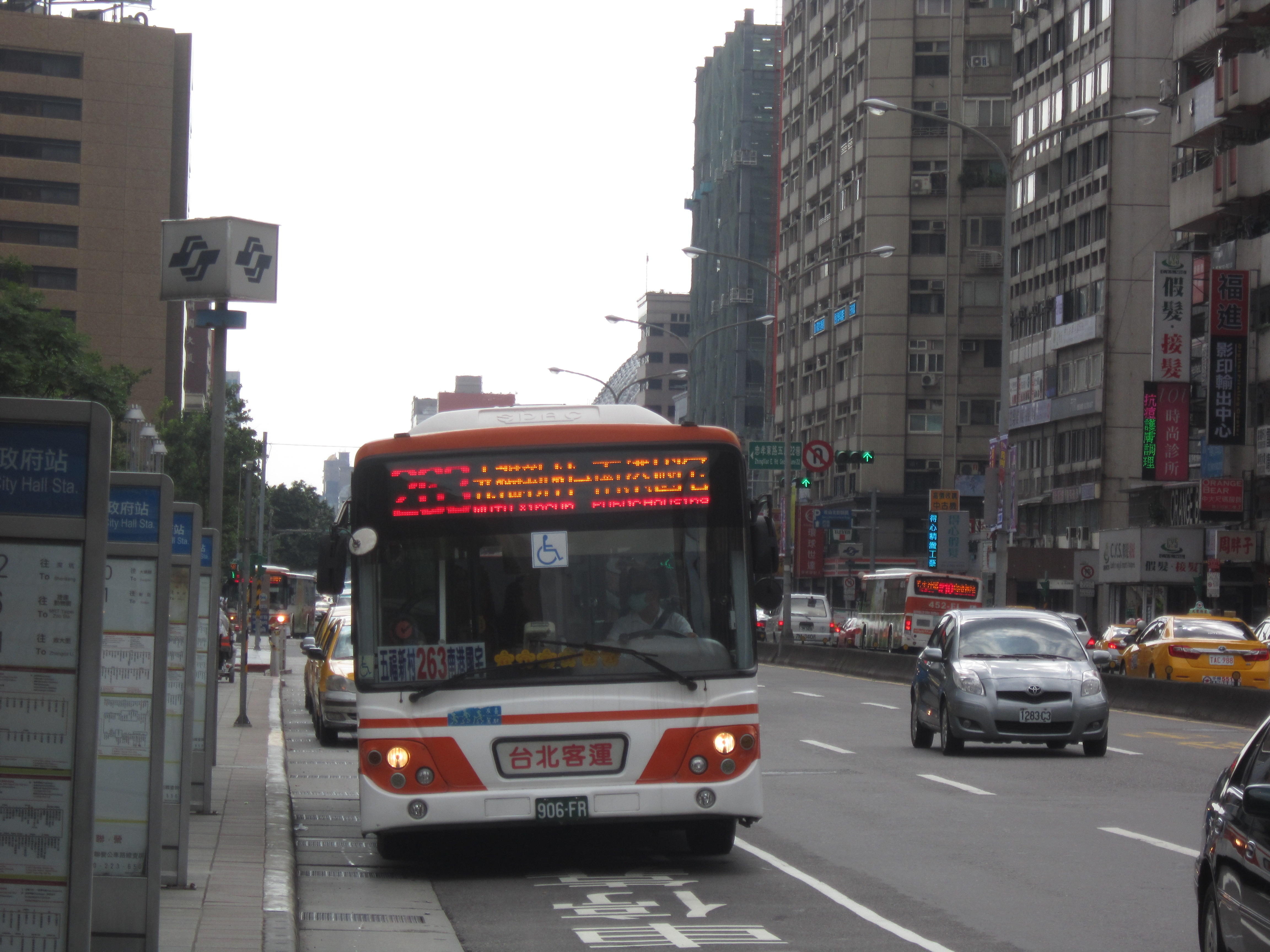 台北客運2011年大宇BS120CN大客車906-FR行駛台北聯營公車263路，在台北市忠孝東路五段停靠台北捷運市政府站。